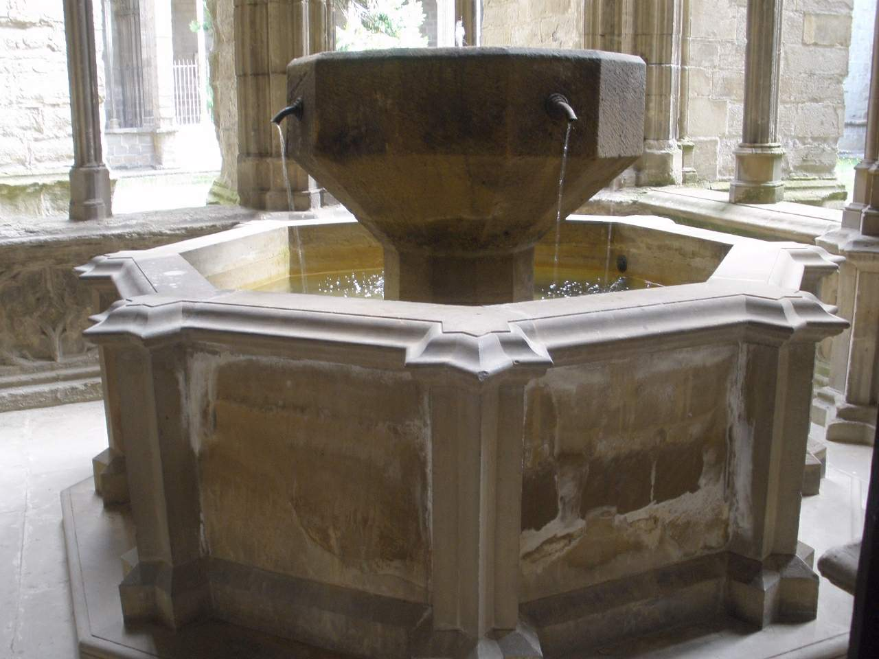 Lavatorio del claustro de la Catedral de Pamplona